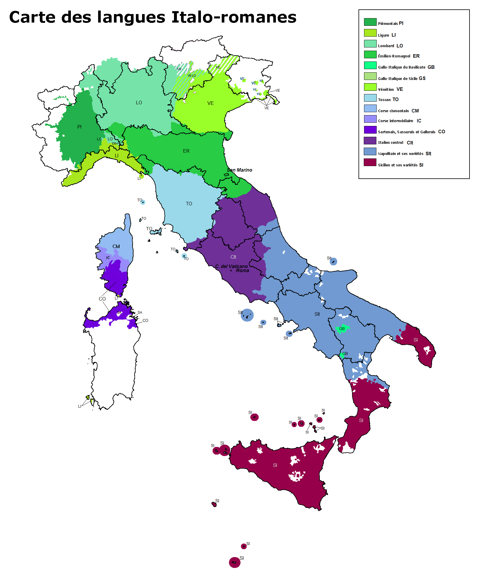 Carte des langues langues Italo-romanes